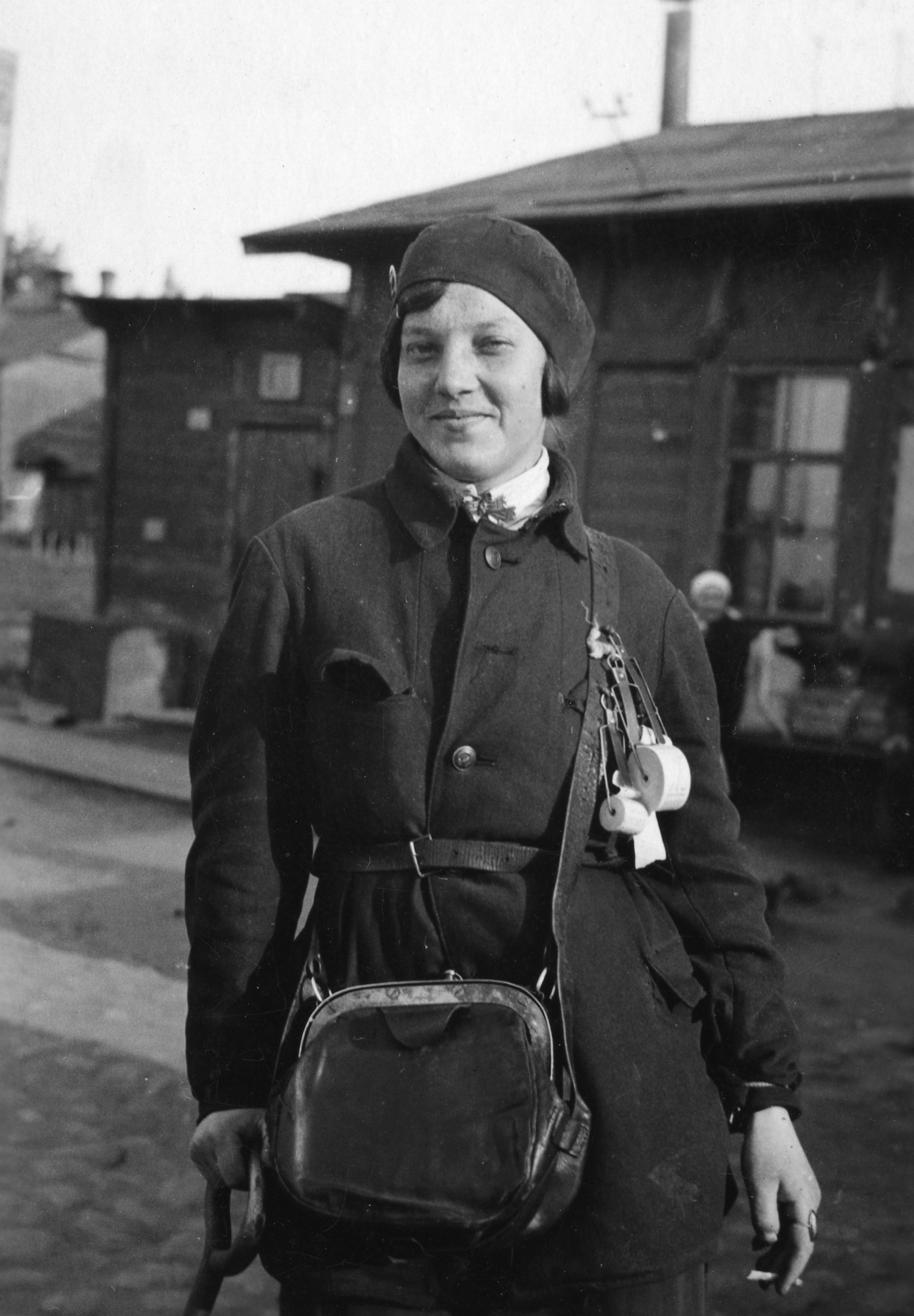 Format: Fotopositiv Dato / Date: 1935 Fotograf / Photographer: Eirik Sundvor (1902 - 1992) Sted / Place: Sovjetunionen, Moskva? Eier / Owner Institution: Trondheim byarkiv, The Municipal Archives of Trondheim Arkivreferanse / Archive reference: Tor.H46.B08.F22673 Merknad: Fra en reise til Sovjetunionen foretatt av Eirik Sundvor 1935. Eirik Sundvor (1902 - 1992) var journalist i Avisa Nidaros 1924 - 1940 og 1945 - ca. 1957. Sundvor flyktet til England med sin kone under krigen. Der var han redaksjonssekretær i Norsk Tidend i London. Sundvor hadde god kjennskap til russisk, og ble derfor sendt som major med oberst Arne Dahls ekspedisjon til Finnmark i 1944 / 1945. Sundvor stod for utgivelsen av den første frie norske avis i Finnmark i 1945. Etter at Avisa Nidaros gikk inn som dagsavis flyttet han tilbake til Bergen, hvor han opprinnelig kom fra. Her virket han som korrespondent for Dagbladet i Vest-Norge.